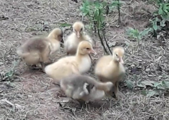 جوجه غاز